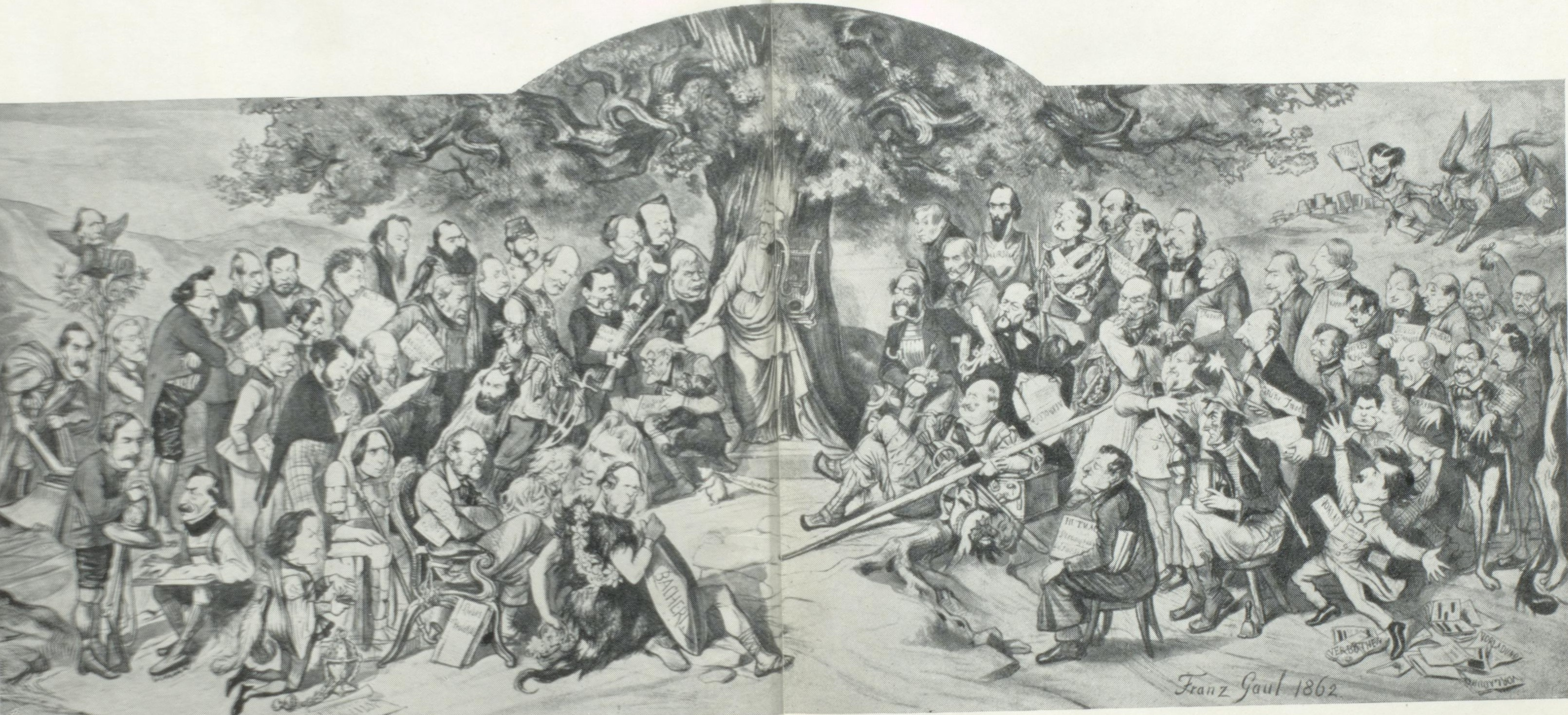 Franz Gaul Der österreichische Parnass 1862. Legende zu dem Bild von Eduard Castle siehe File:Franz Gaul Der österreichische Parnass 1862 Legende.jpg